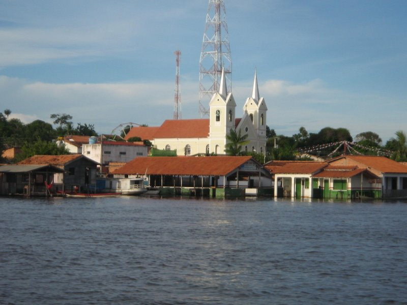 Vista inicial da cidade de Alenquer